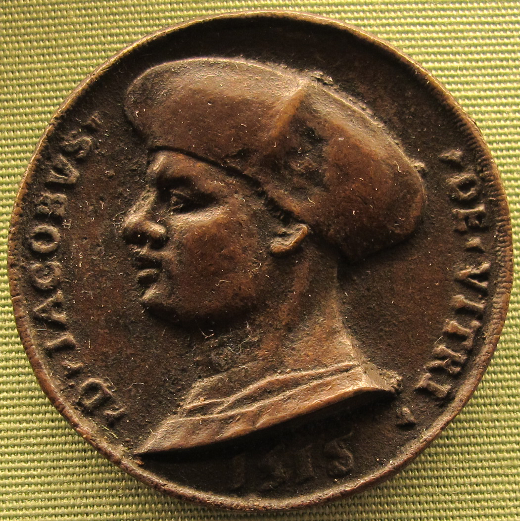 Ignoto, cardinale Jacques de Vitry (1170-1240), 1518